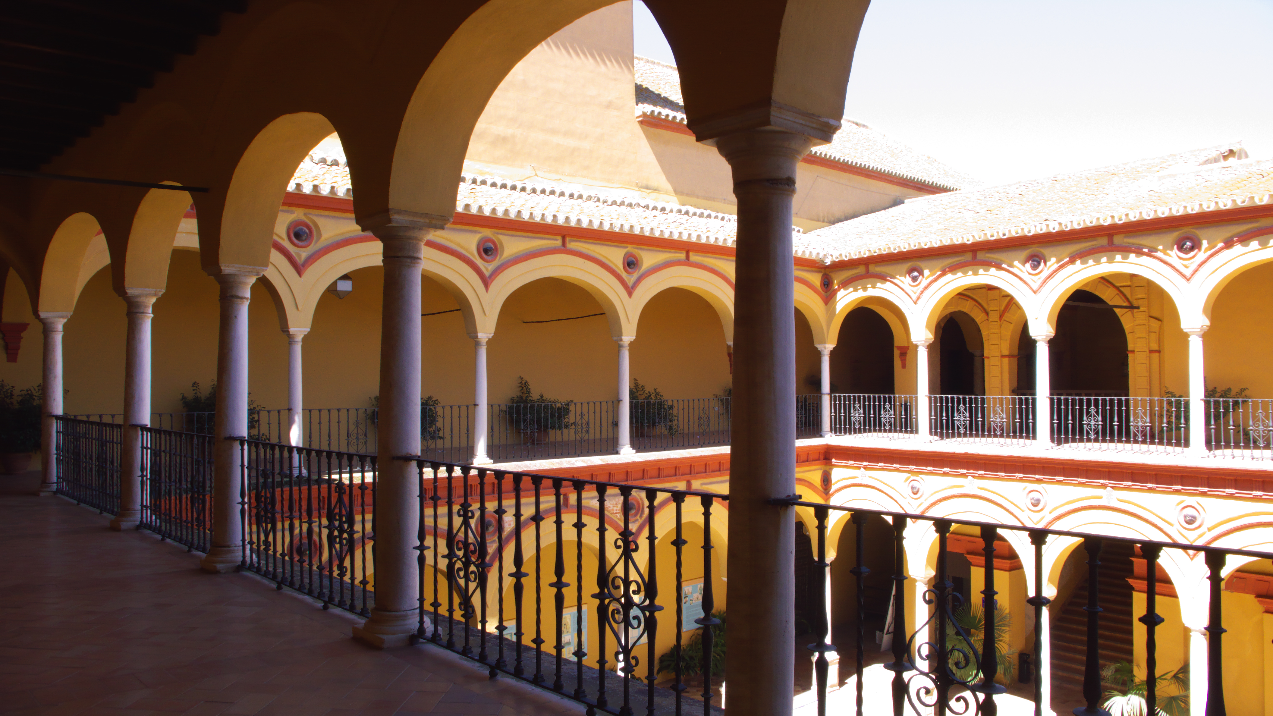 Ajustado a los cánones manieristas